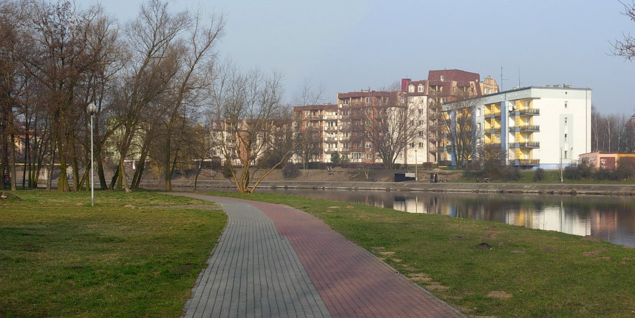 Park Centralny w Bydgoszczy